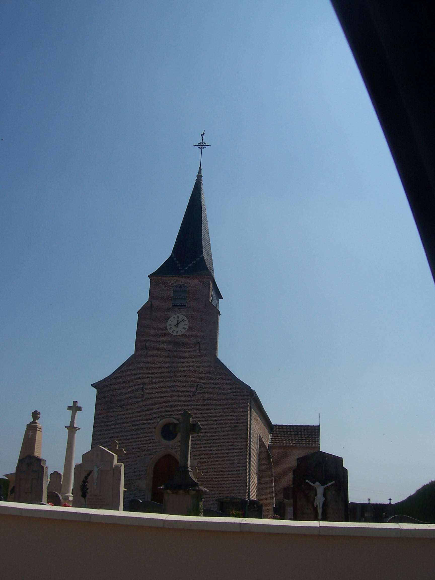 Eglise de Serrigny-en-Bresse